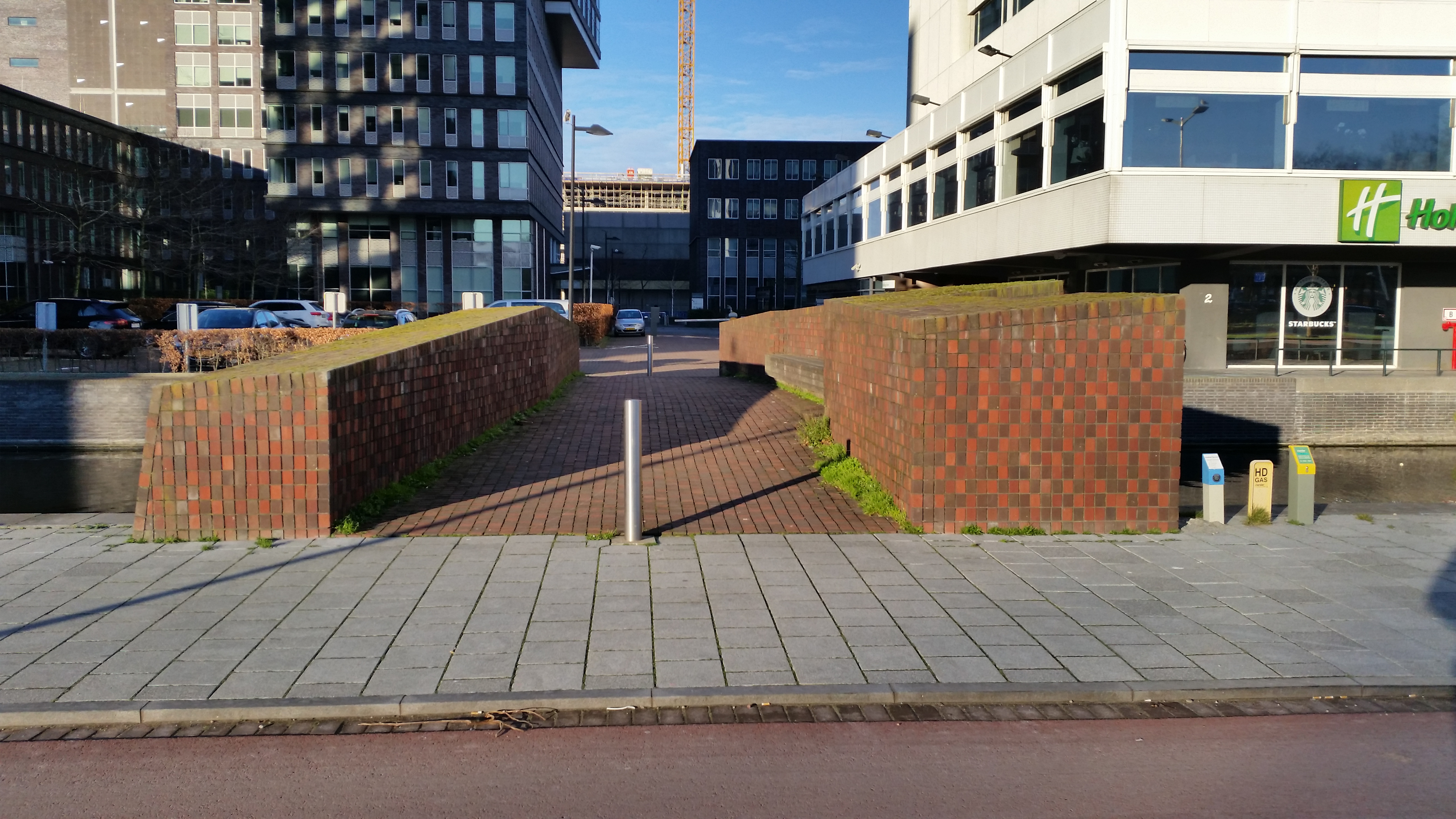 Overzicht van Brug 865 (in Amsterdam); rechts restaurant van Holiday Inn